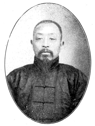 中文（台灣）: 中華民國國會議員